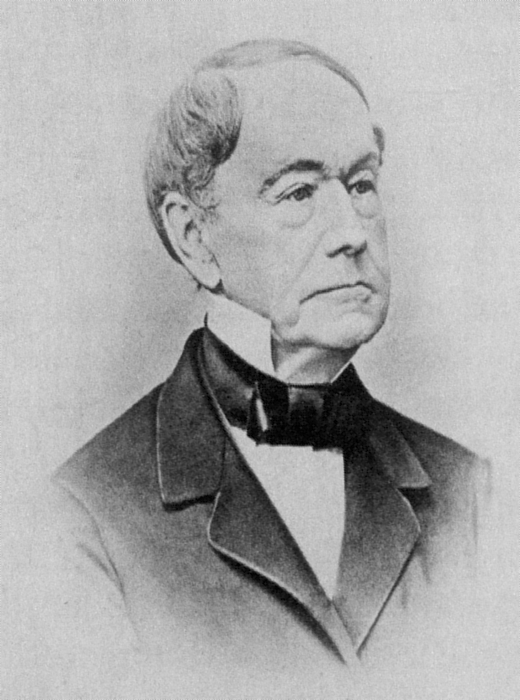 Detloff Karsten (1787-1879), Bürgermeister und Ehrenbürger von Rostock.